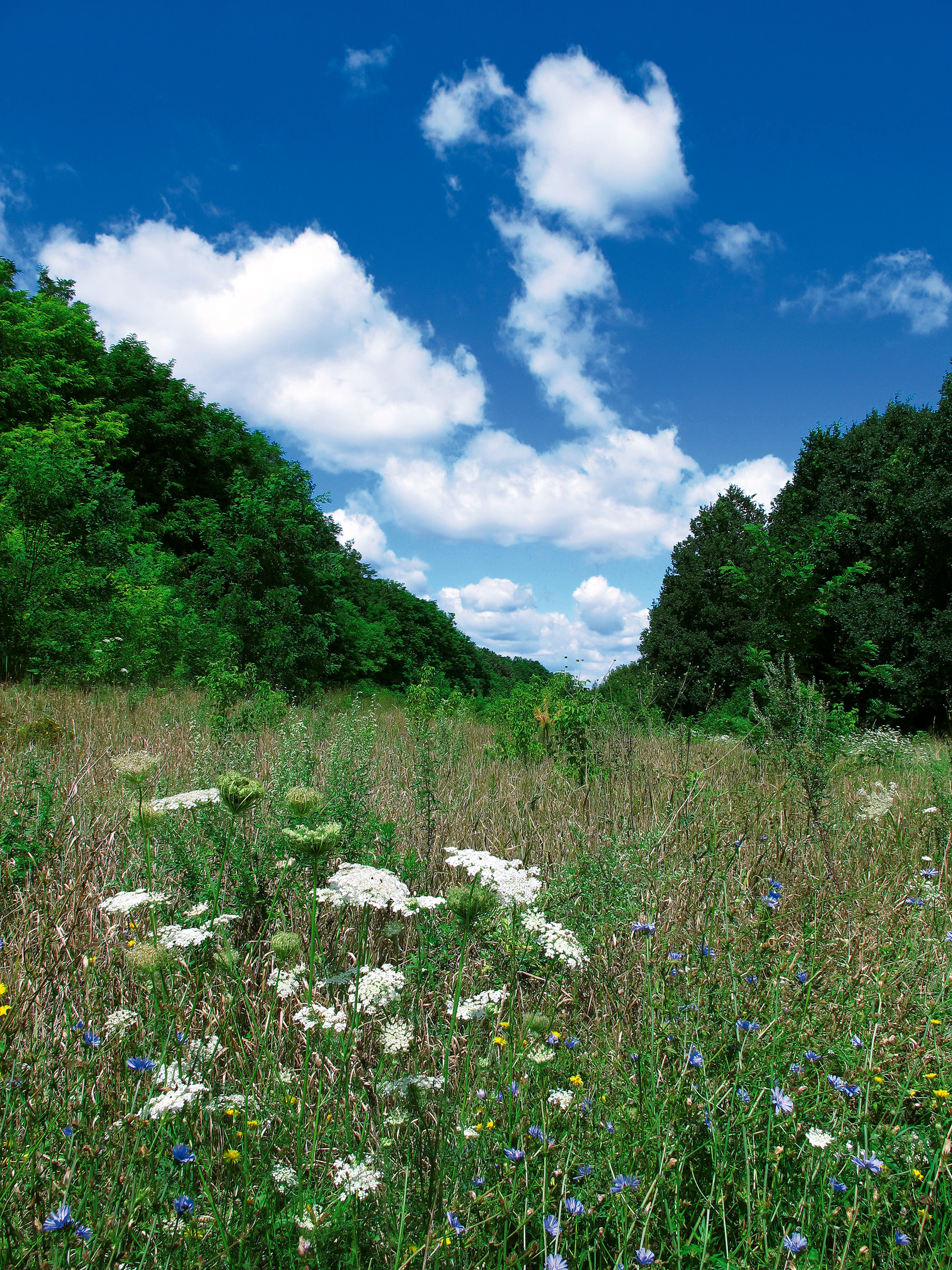 Тальвег балки Парної